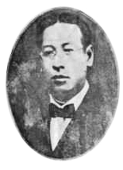 郑烈